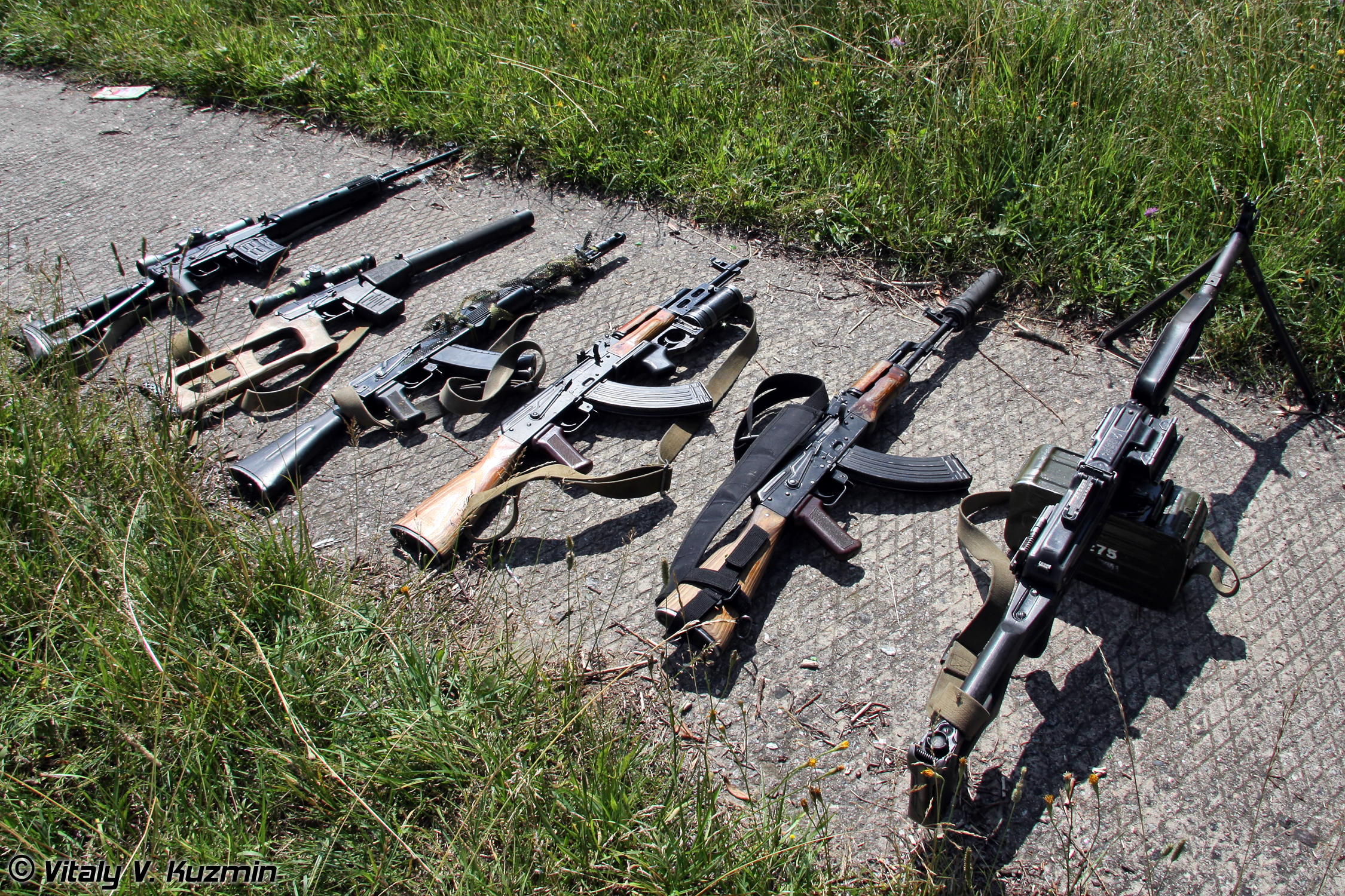 СВДС, ВСС Винторез, АК-74, АКМ с подствольным гранатометом ГП-25, АКМН с ПБС и ПКП Печенег (SVDS, VSS Vintorez, AK-74, AKM with GP-25, AKMN with PBS and PKP Pecheneg)